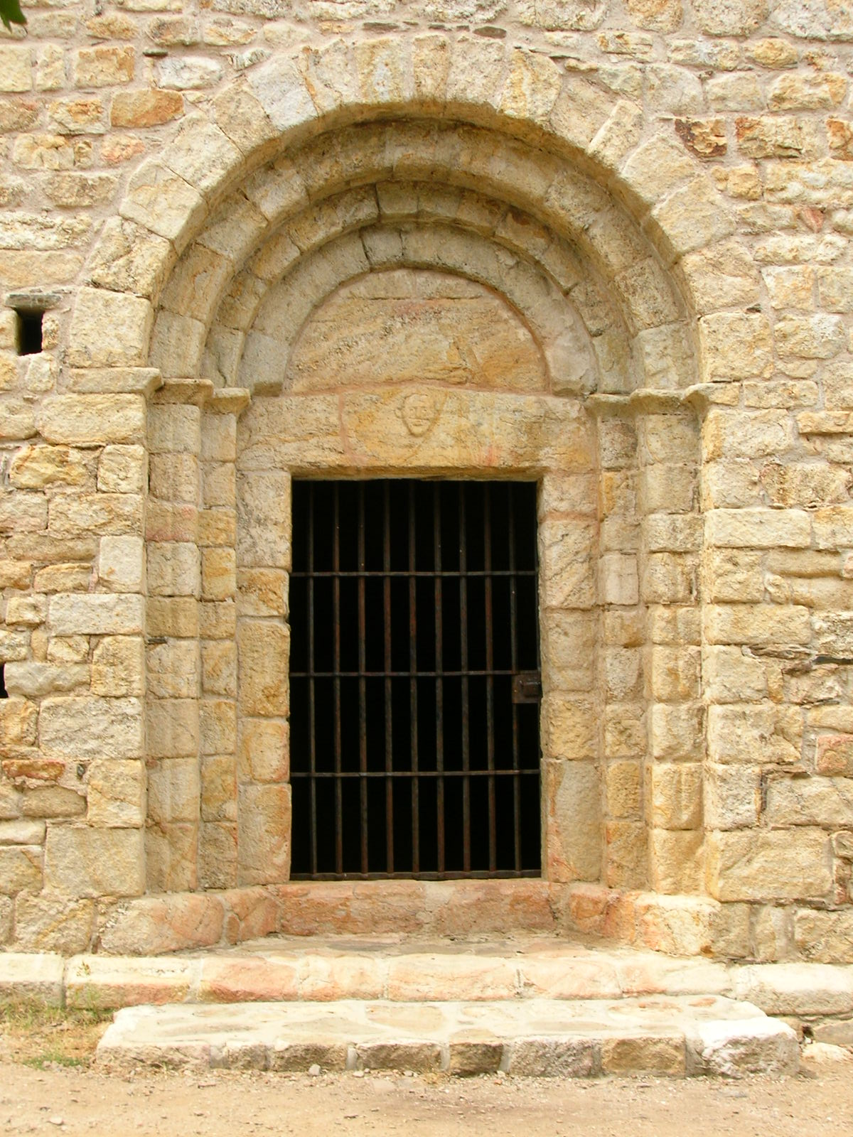 Vue du portail de l'église Saint-Laurent-du-Mont à Argelès-sur-Mer.